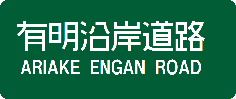 有明沿岸道路の高速案内看板